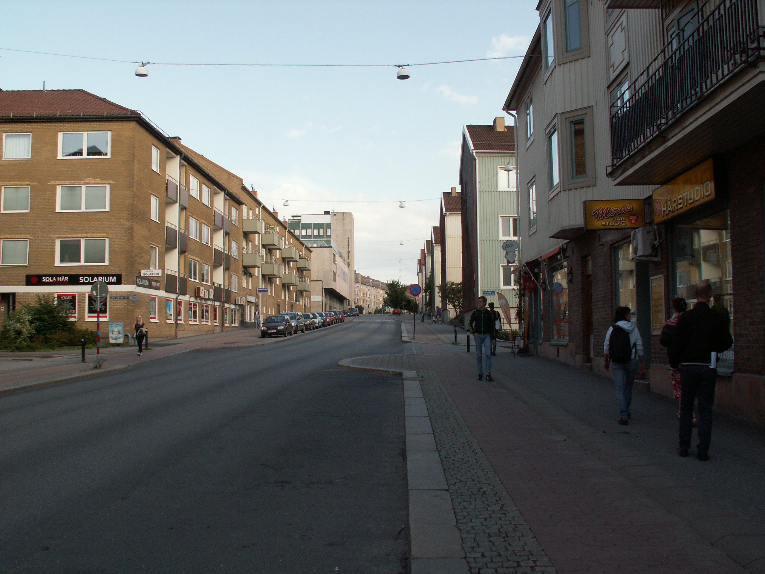 Slottsskogsgatan i Kungsladugård i västra Göteborg. Nordvästligaste delen. Vy nerifrån Jægerdorffsplatsen.